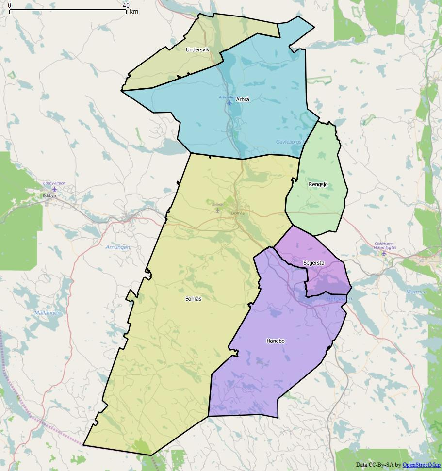 Distriktsindelningen i Bollnäs kommun